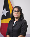 Virgínia Ana Belo, Abgeordnete des Nationalparlaments Osttimors